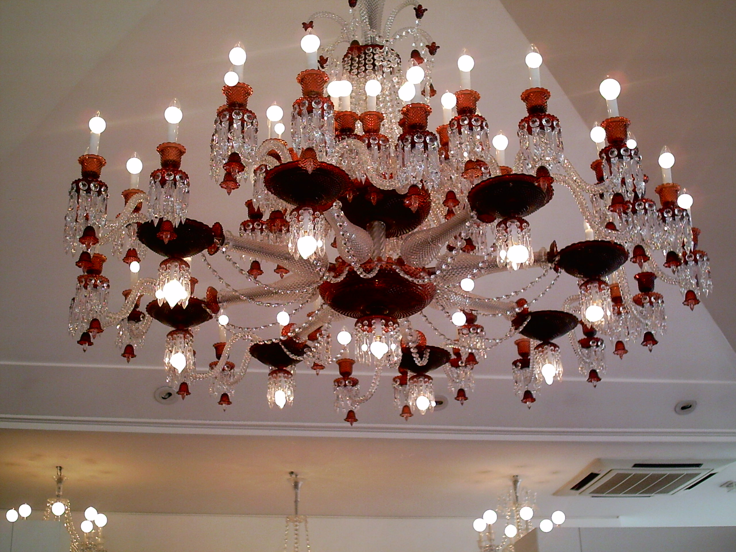 Photo personnelle